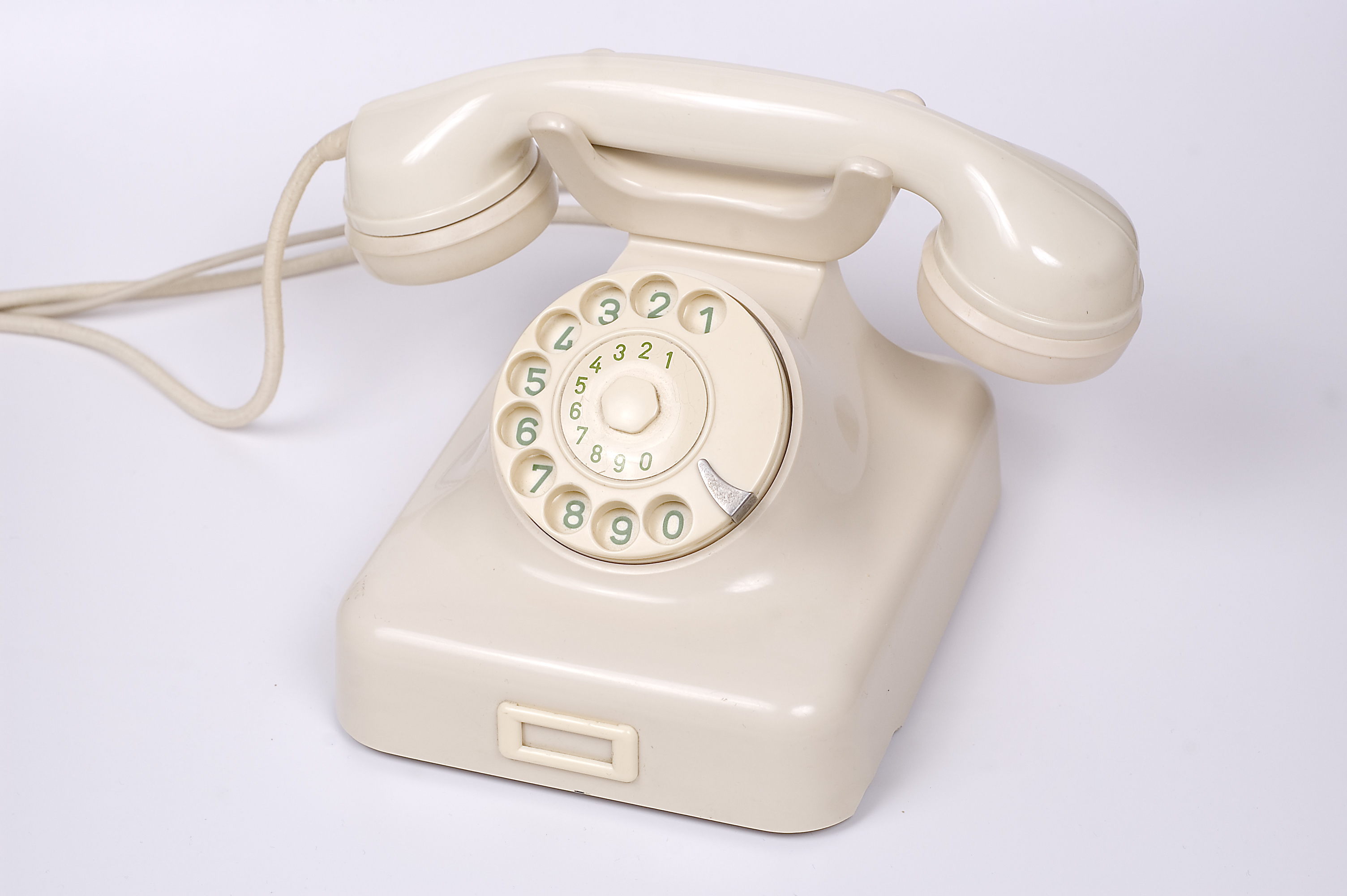 W 48 elfenbeinfarben